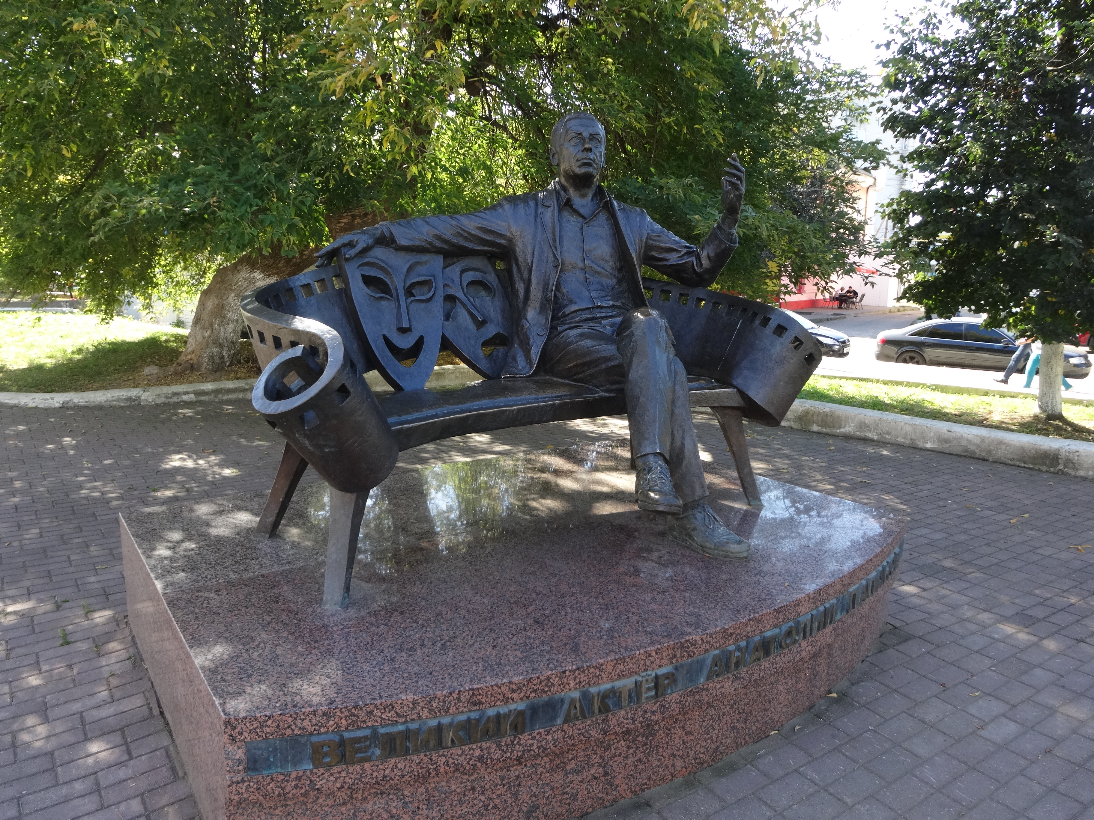 Памятник актеру уроженцу города Вязьма